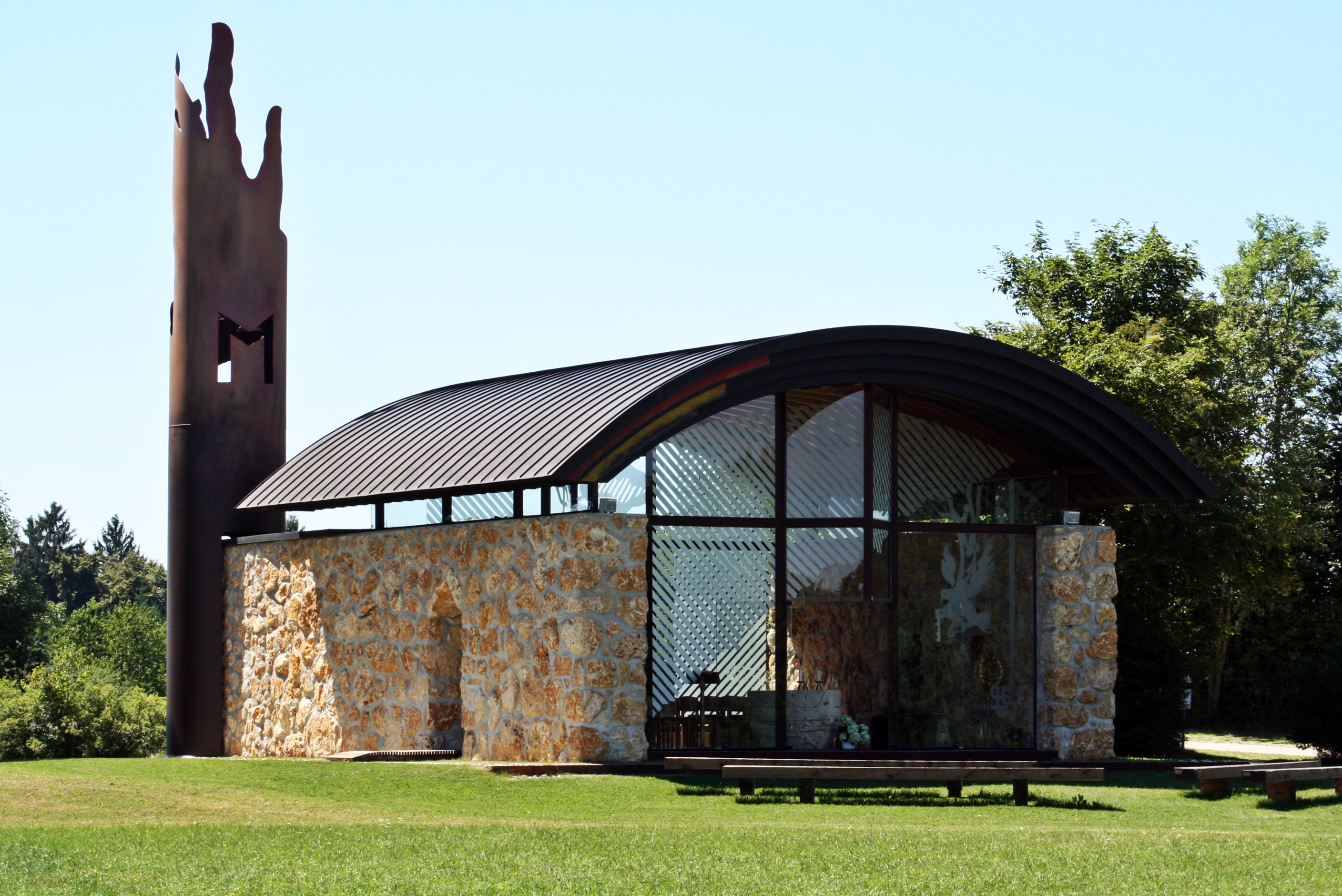 Außenbereich